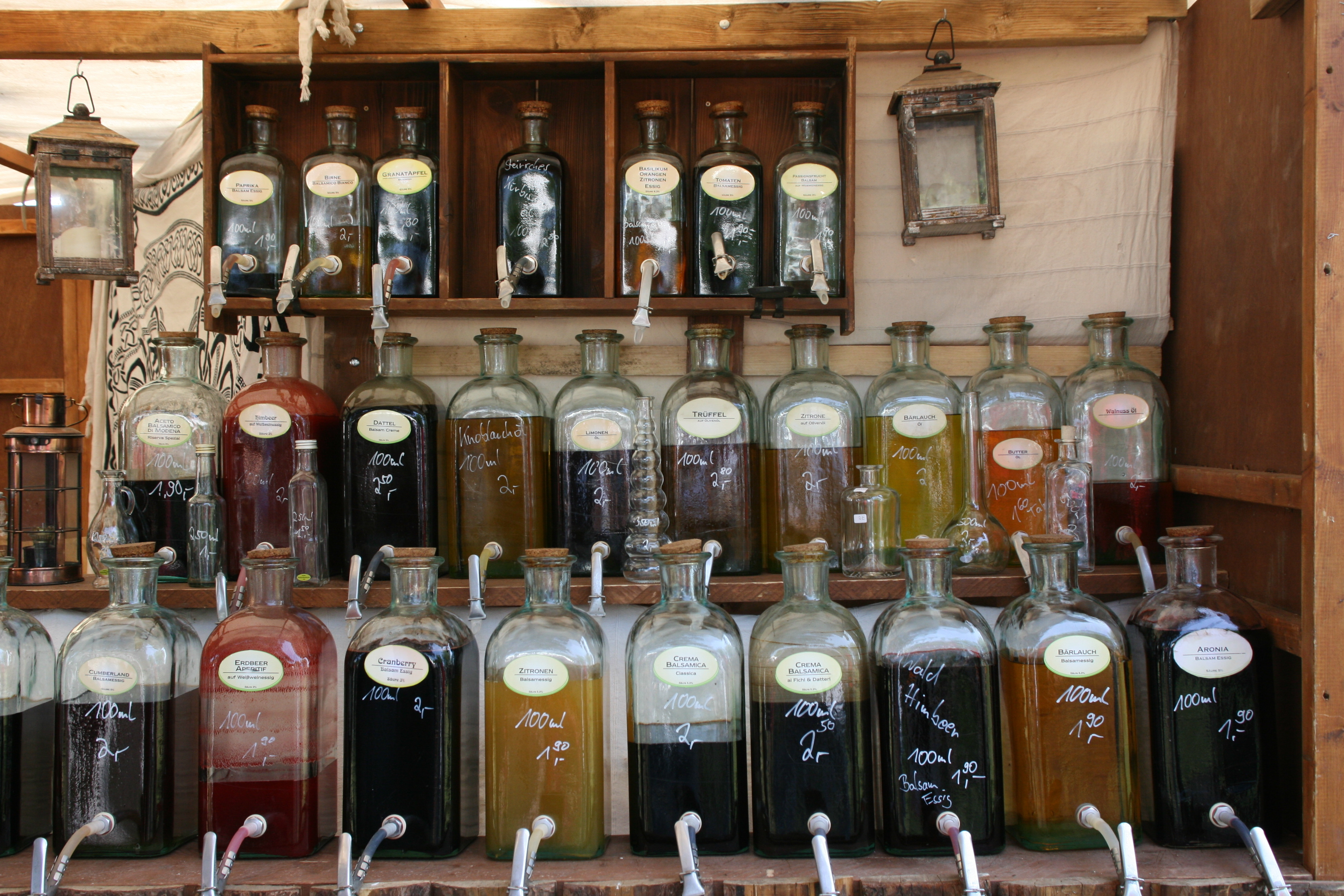 Spectaculum 2011 in Wassenberg